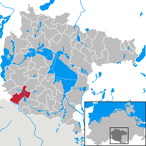 Fincken in Mecklenburg-Western Pomerania - District Müritz